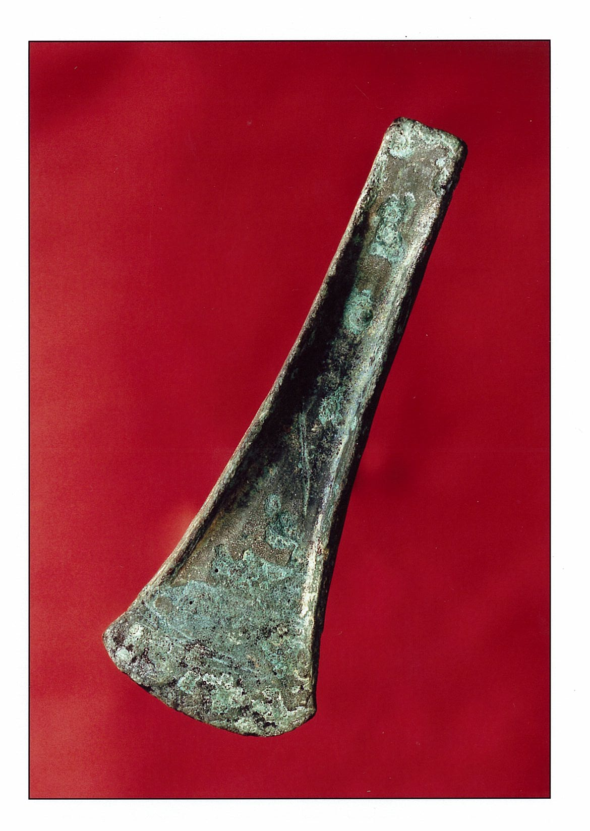 Hache de bronze datée de 1200 à 1500 avant notre ère, découverte à Sombrun en 1960 par Paul Dieuzeide. Actuellement exposée dans le musée archéologique de Maubourguet.